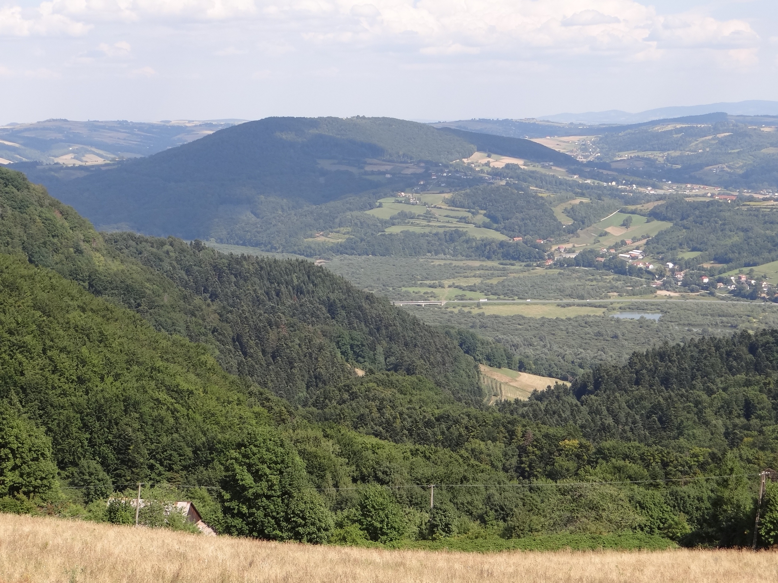 Dąbrowska Góra, widok z Białowodzkiej Góry